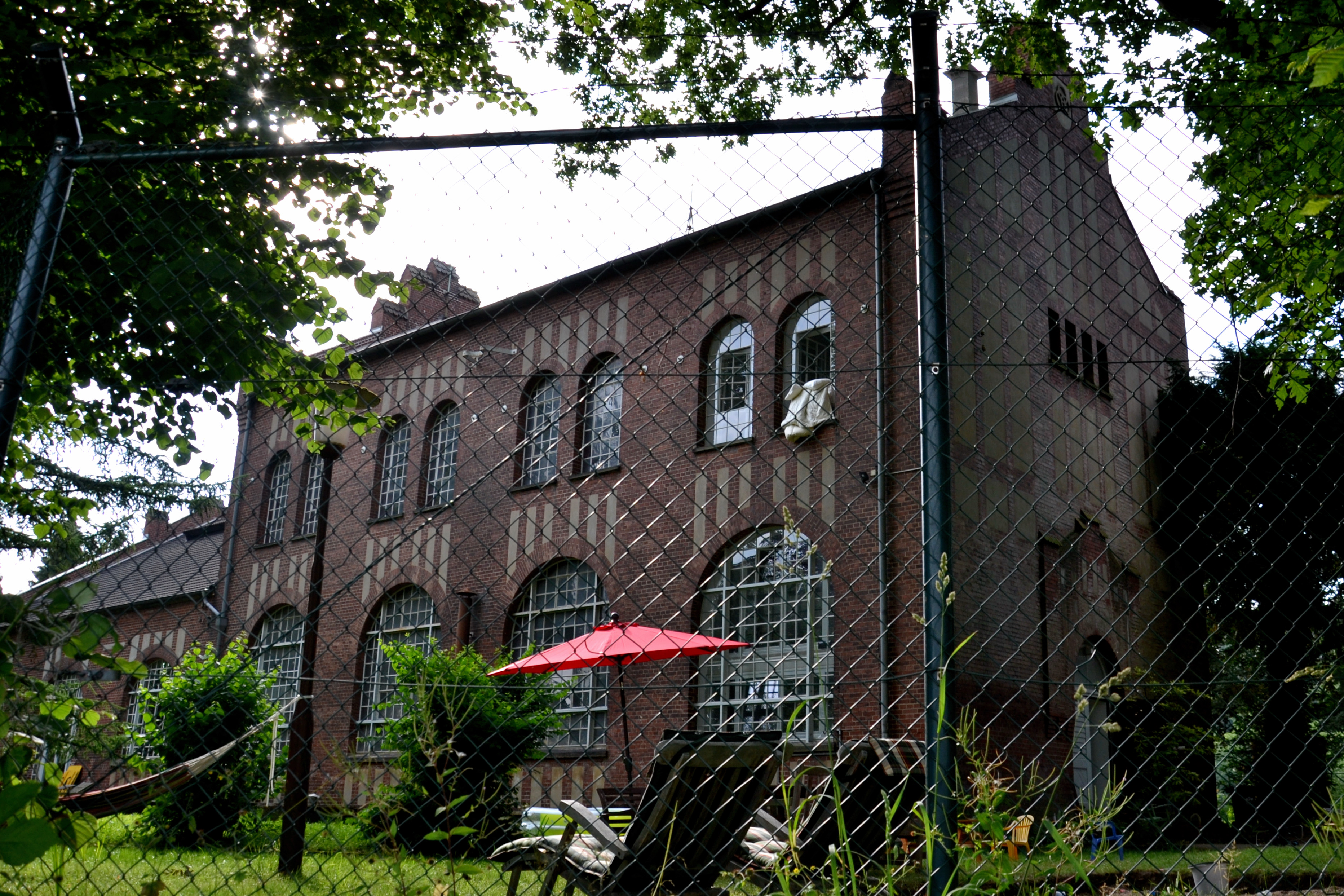 Wasserwerk an der Ruhr, erbaut durch Krupp zur Versorgung der Villa Hügel, der Krupp-Wohnkolonien und der Krupp Gussstahlfabrik